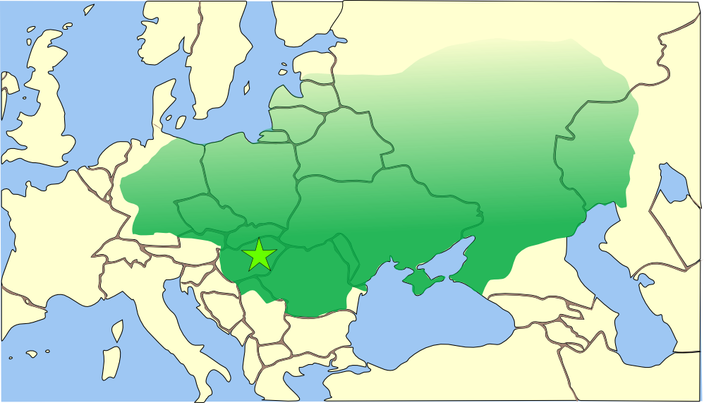 El imperio huno se extendía desde las estepas de Asia Central hasta la actual Alemania, y desde el Danubio hasta el Báltico This is a map of the empire of Attila the Hun, circa 450 CE (AD),skettenploetskpoe jok odern borders. The borders of Attila's empire are only approximate because: The empire was a very loose collection of conquered peoples and did not have the structure of a formal empire (such as the Persian or Roman Empires). Records of the eastern and northern borders of Attila's empire are nearly non-existent. The territories which paid protection fees or tribute to Attila should be marked out in a secondary color to show the true extent of his influence and the reach of his empire. It is incorrect to regard cities like Constantinople who paid tribute to be independent or free states, even if they maintained self governance. Regardless of whether they fit the correct definition of colonies, they where certainly not free. The star shows the approximate location of the capital of Attila's empire. It is not known with any certainty where the capital was actually located. It was either based on the ruins of the Roman city of Acquincum (today's Budapest), or it was his mobile 'wooden castle' (as described by Priscus Rhetor on his visit to Attila's camp), which was based primarily in the Hungarian Great Plain, somewhere near the Tisza River.